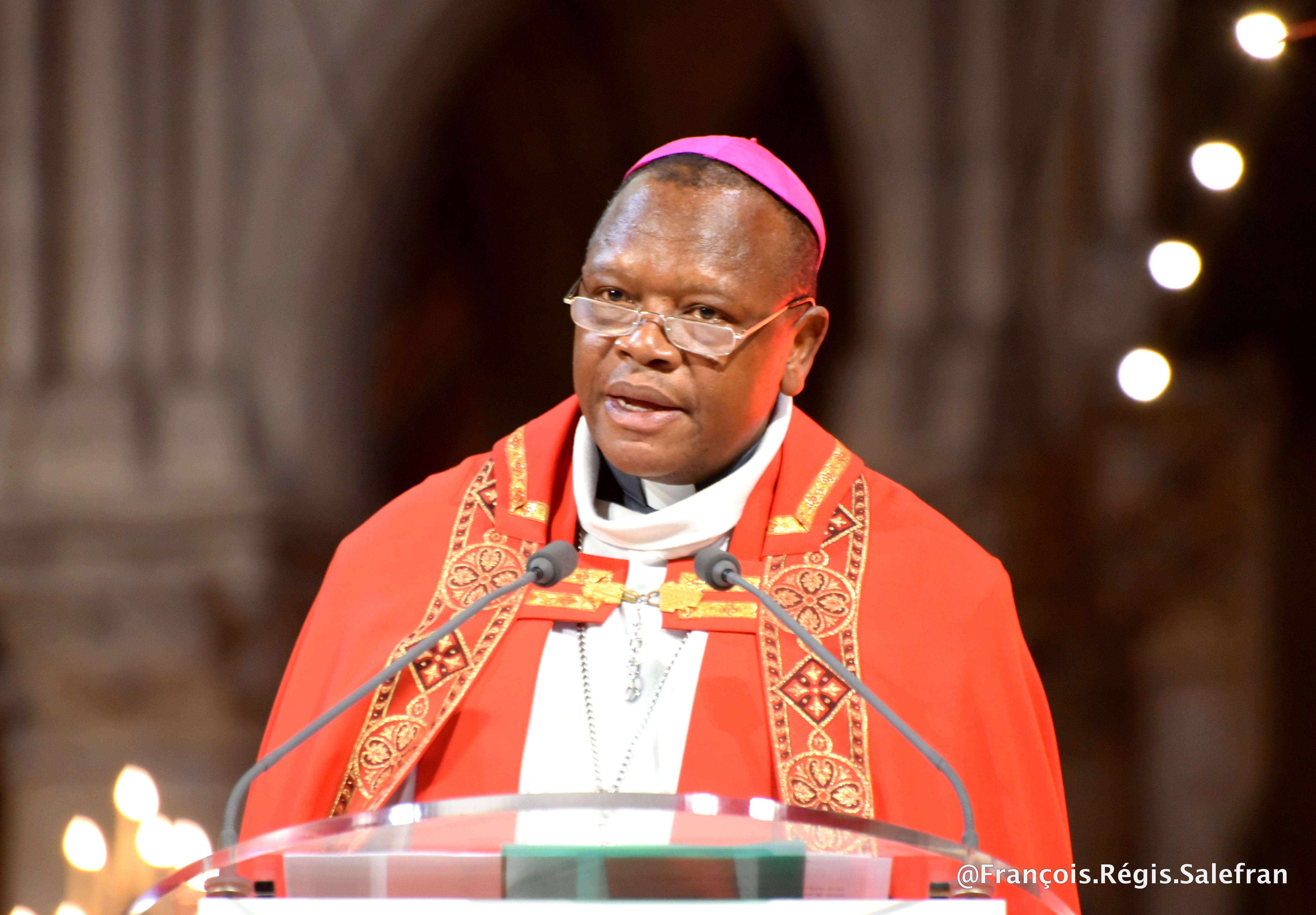 Mgr Fridolin Ambongo lors de la 11ème Nuit des Témoins d'Aide à l'Église en Détresse à Paris.